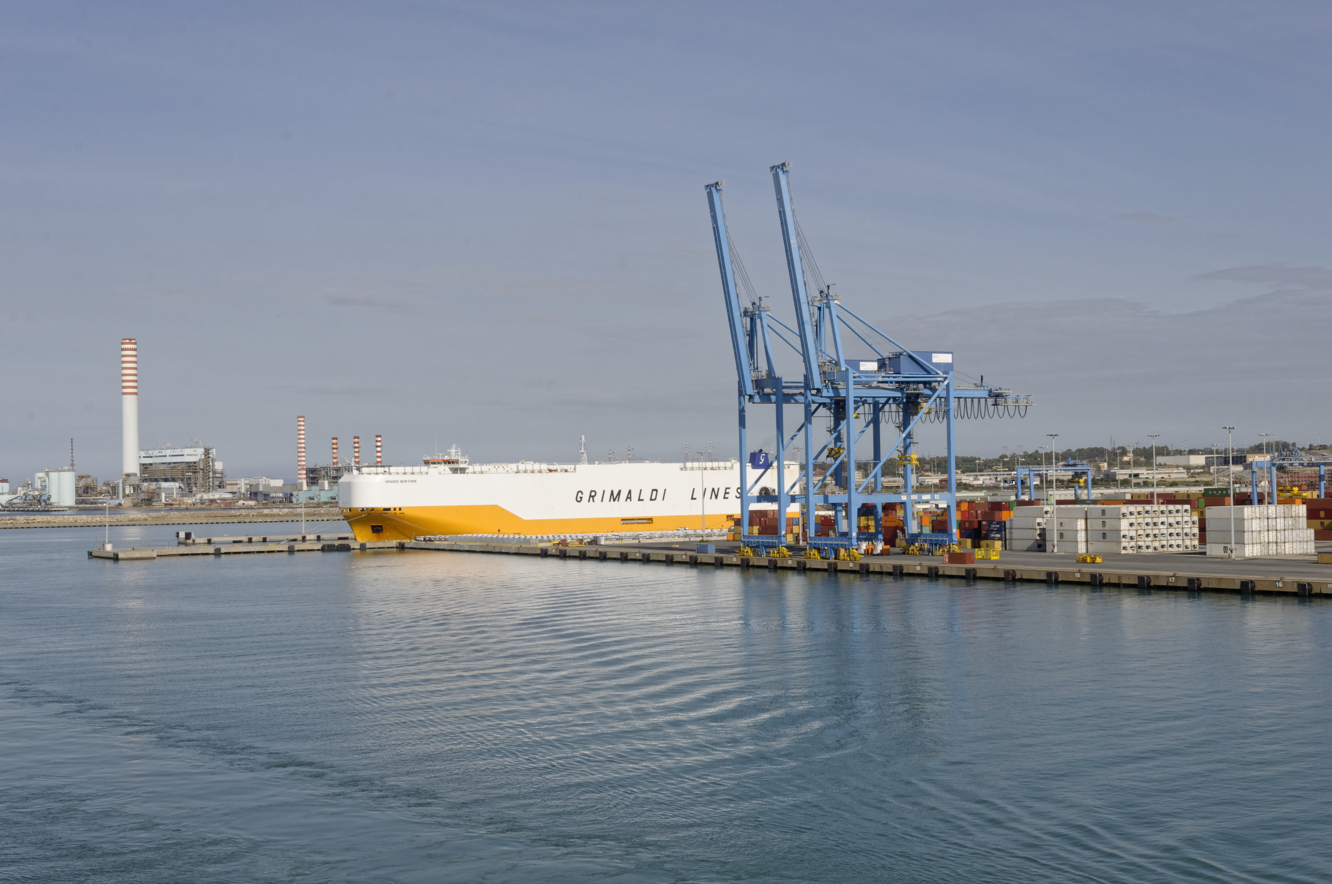 Civitavecchia 2019 -Porto e Navi